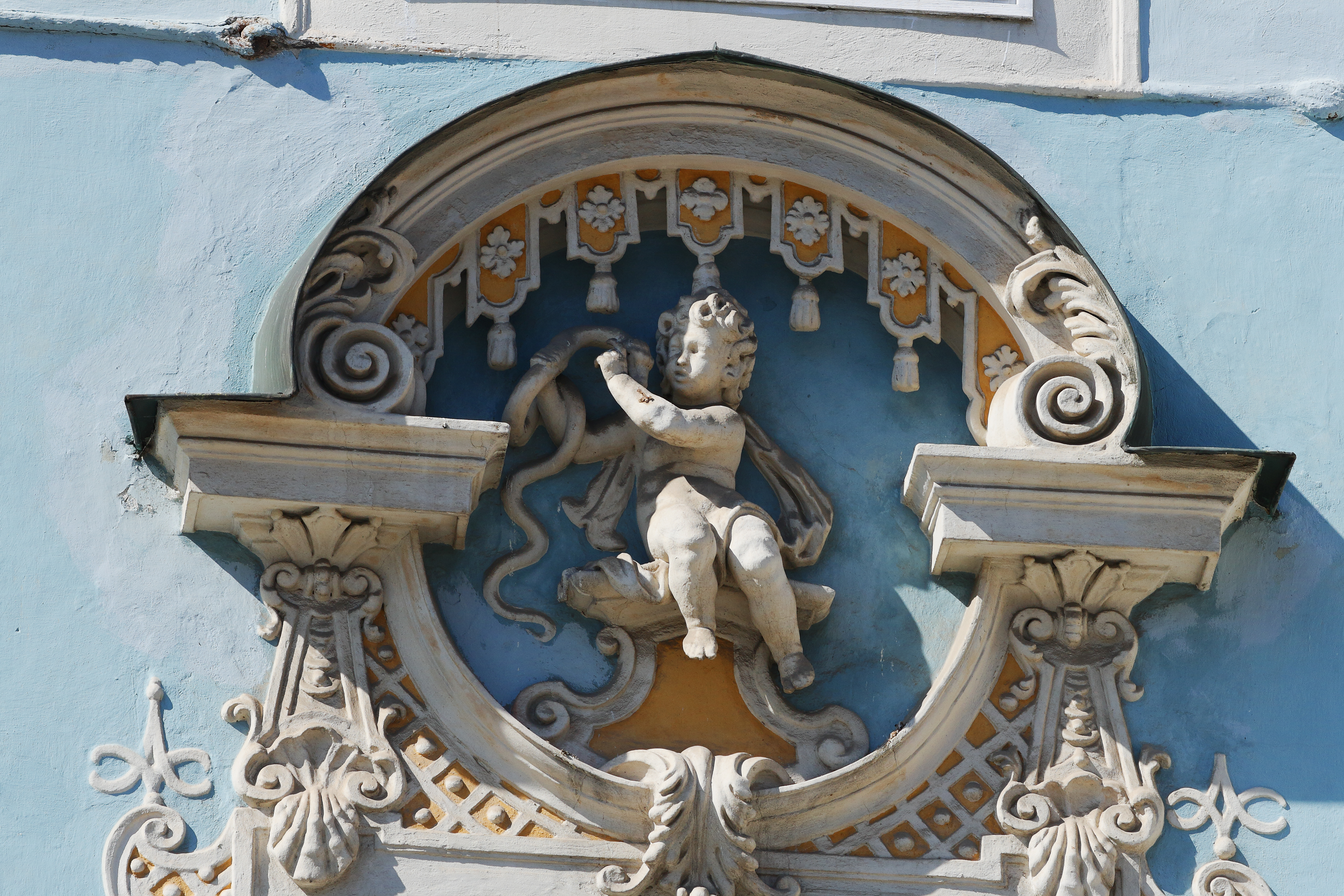 An der Fassade des Steyrer Sternhauses befinden sich über den Fenstern des zweiten Stockes Allegorien der fünf Sinne. Hier das fünfte Feld von links mit dem Thema „Gefühl“